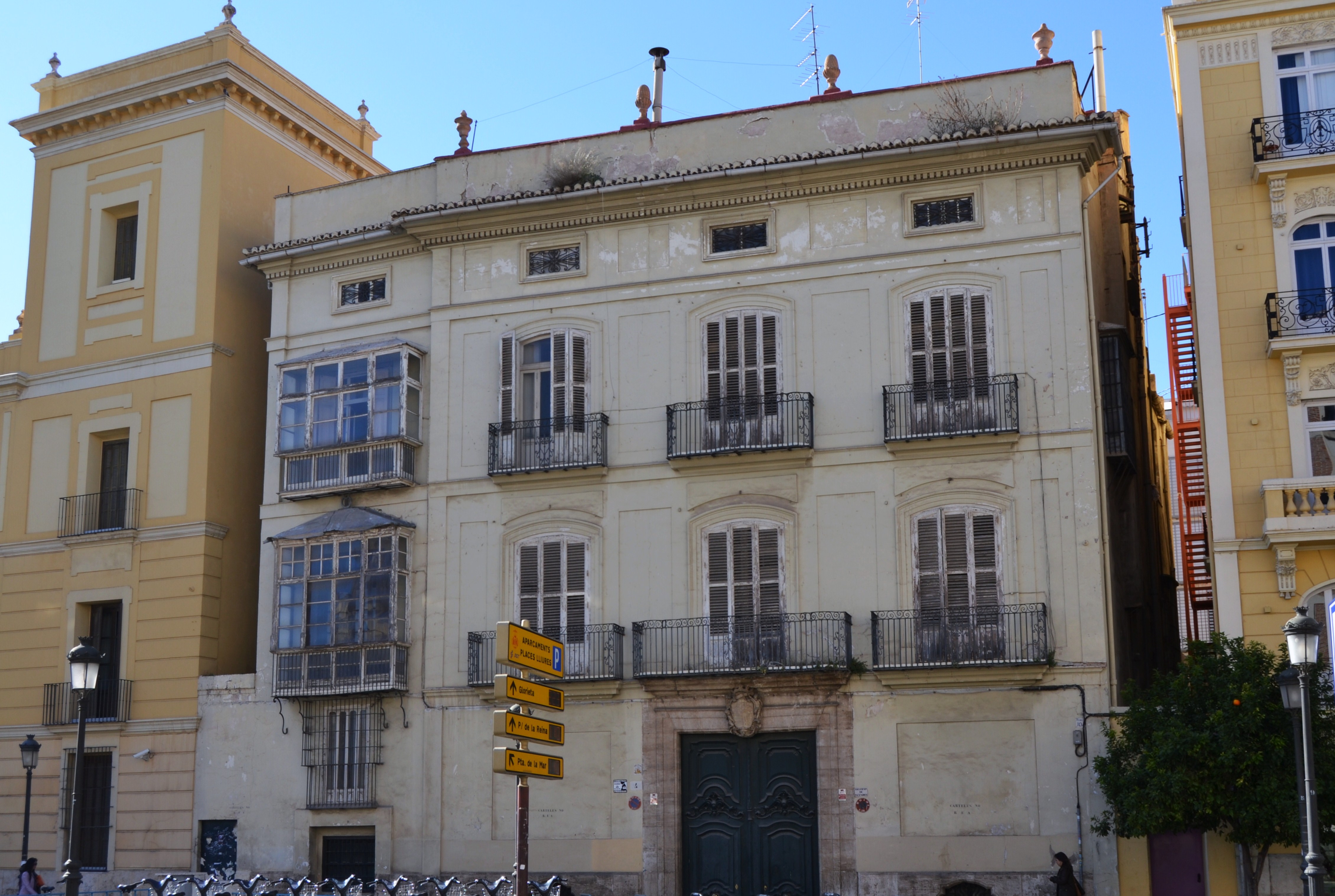 Palau dels Marquesos de Montortal, València.